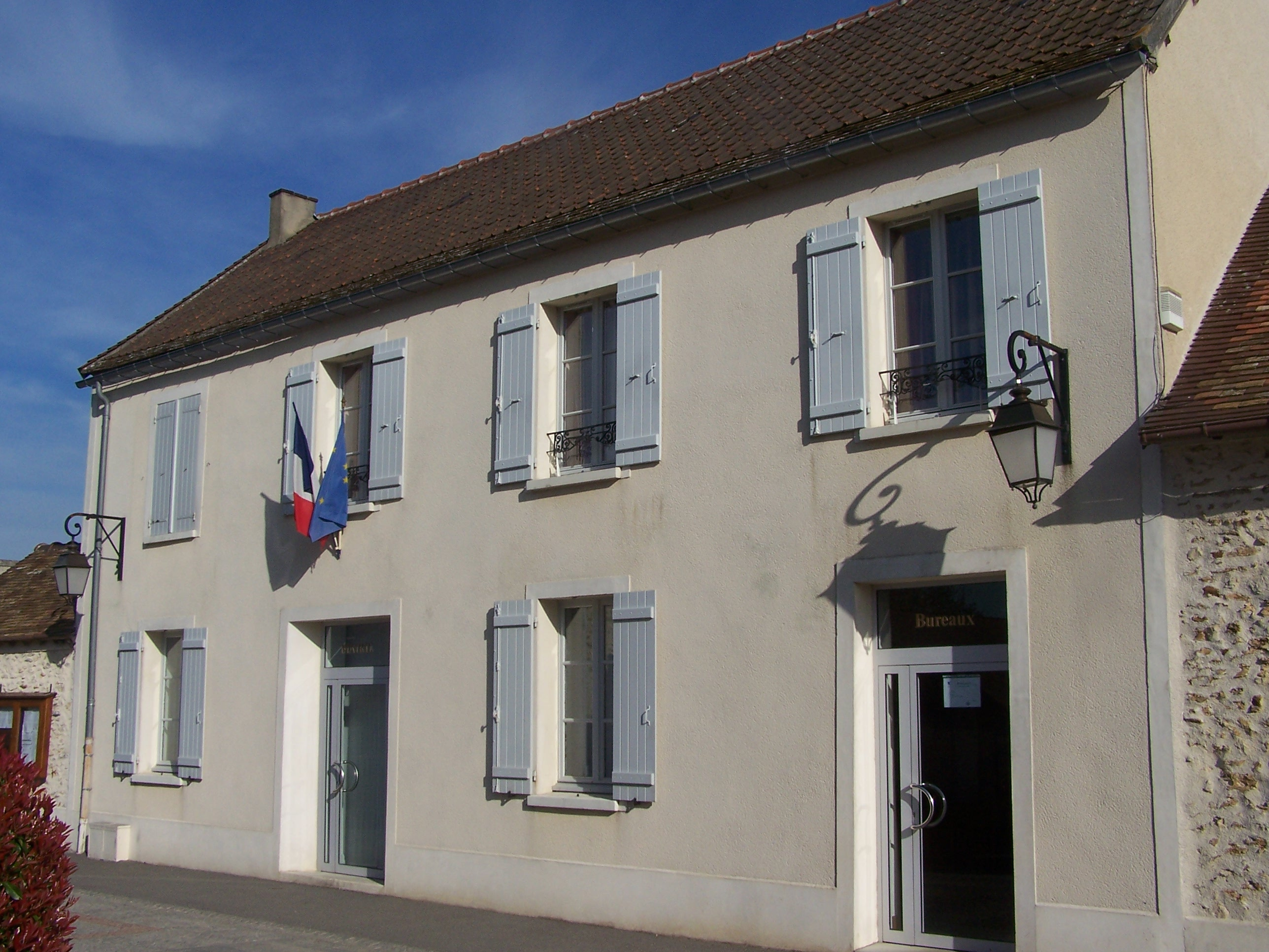 Mairie de Prunay-en-Yvelines, Yvelines, France